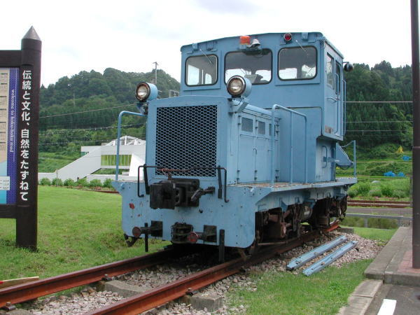 道の駅まつだいふるさと会館、ほくほく線建設用モーターカー